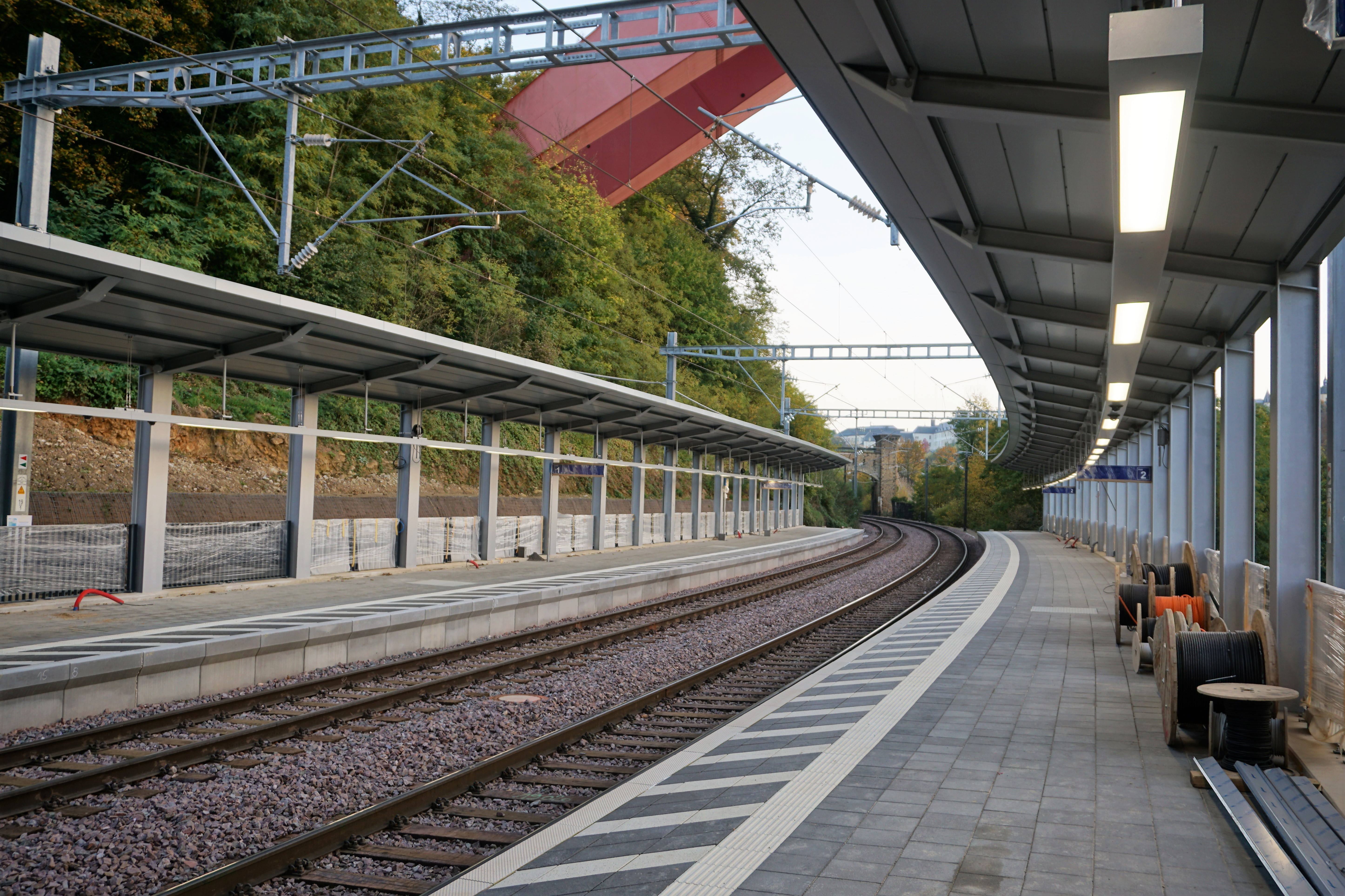 Luxembourg, gare CFL Pfaffenthal-Kirchberg en construction. Quai, vue en direction sud (Luxembourg).